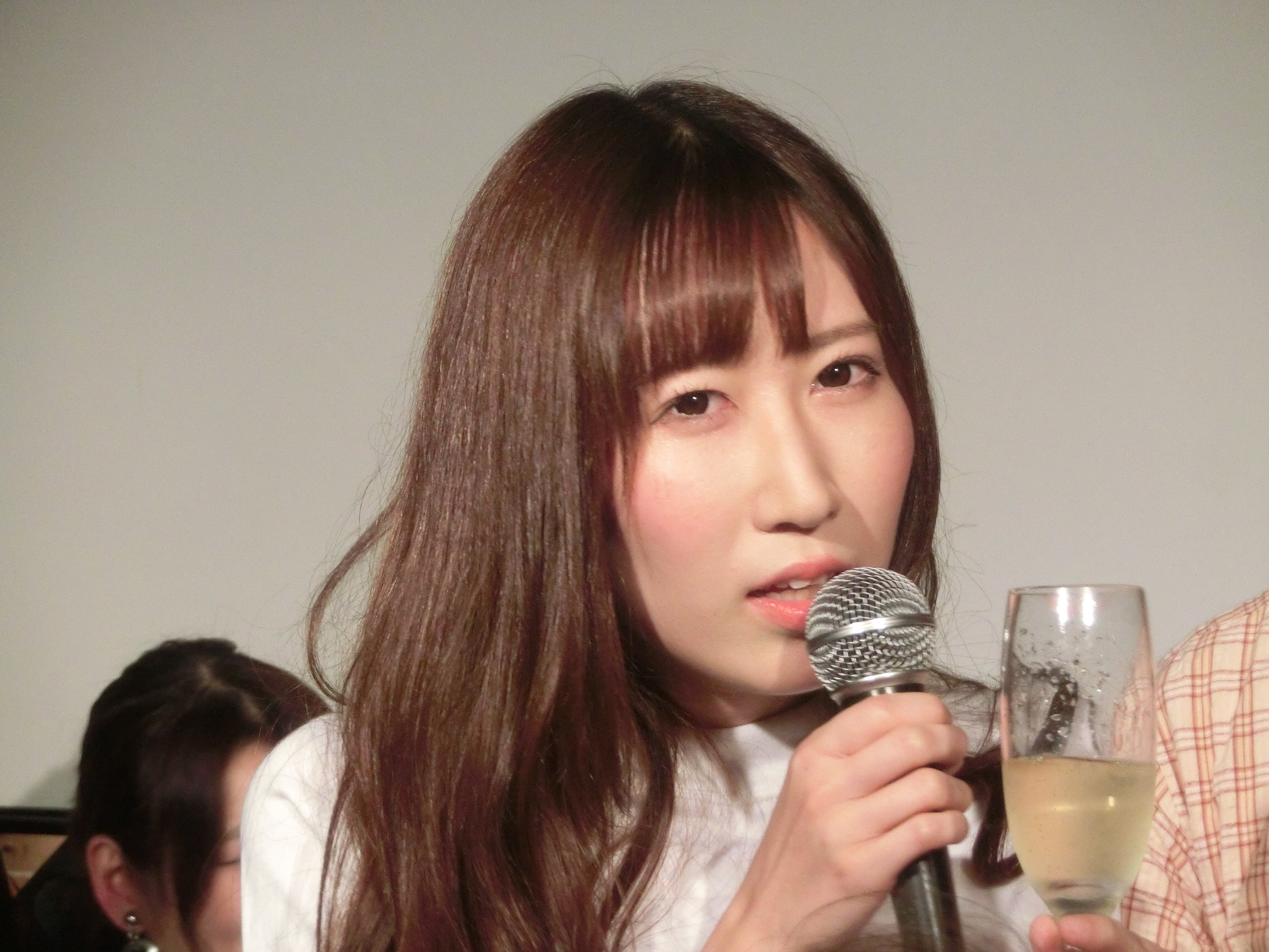 2019年10月6日、Adult video supporting actress prize